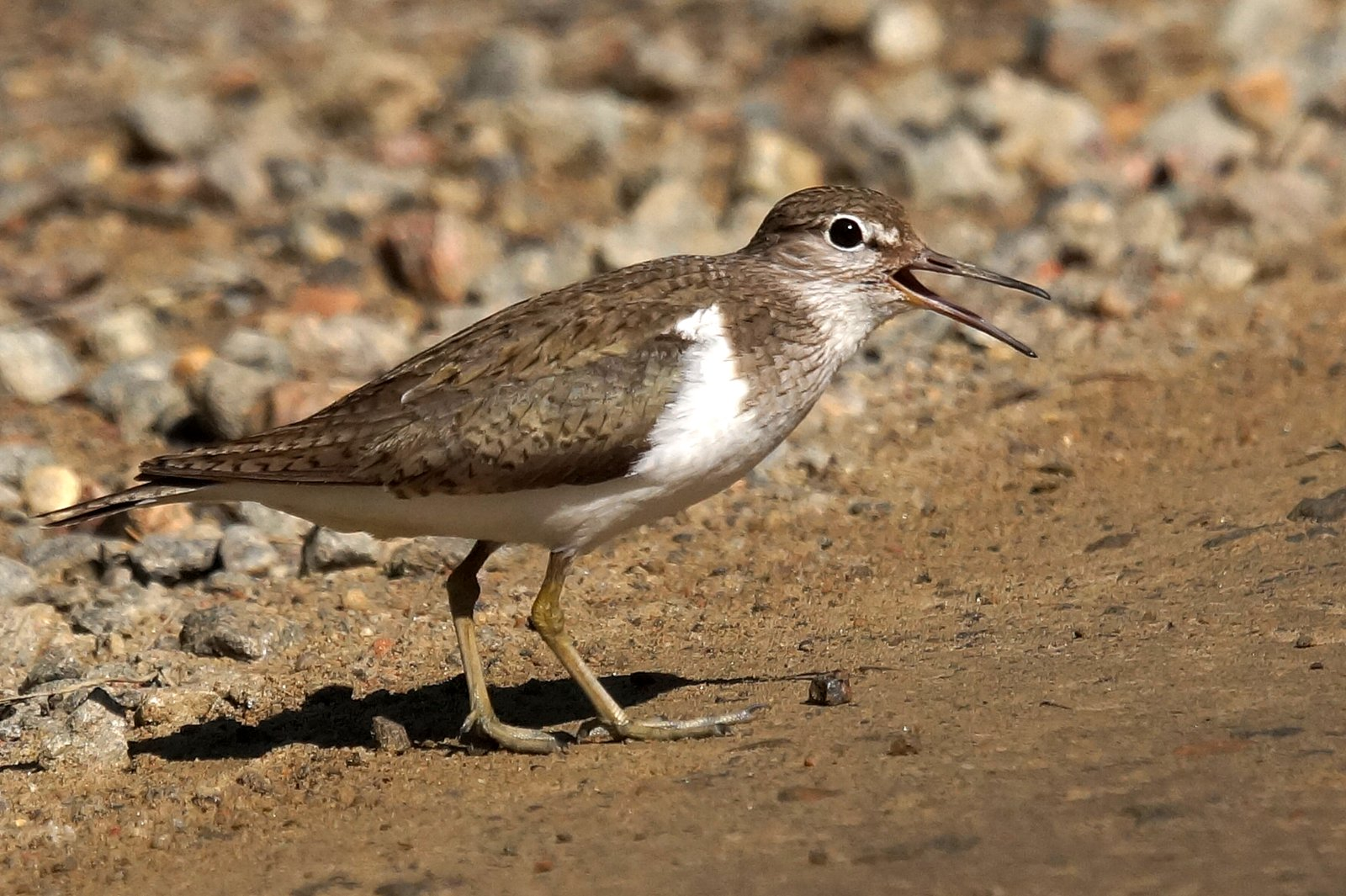 Rantasipin poikanen. Pälkäne Haltia